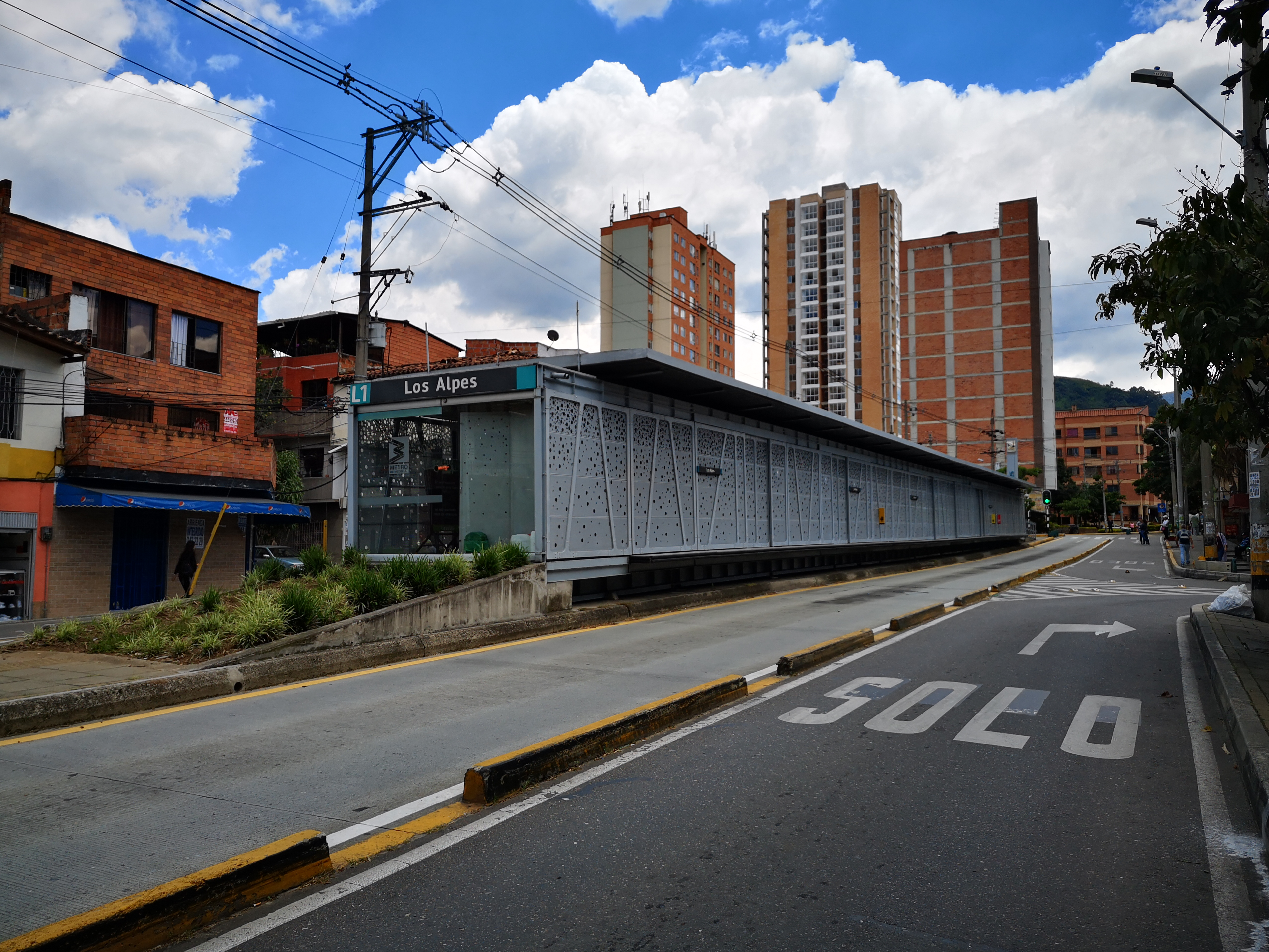 Aspecto de la estación Los Alpes del Metroplús en Medellín, vista desde la Calle 30 hacia el occidente.